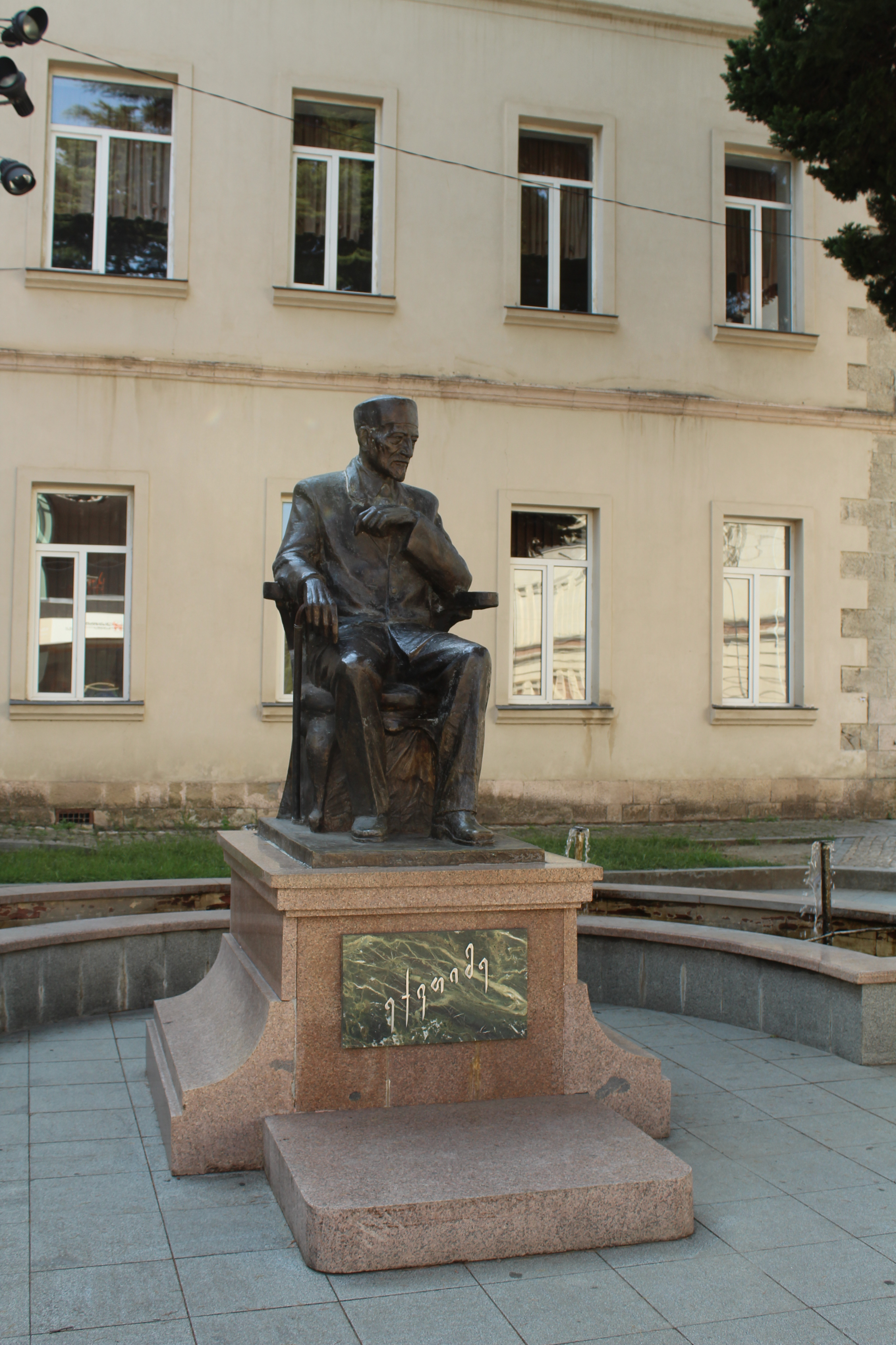 1 საშუალო სკოლის შენობა